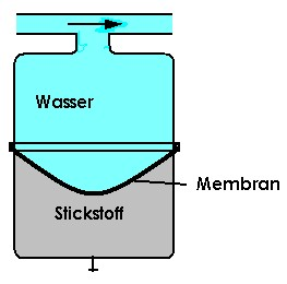 MAG